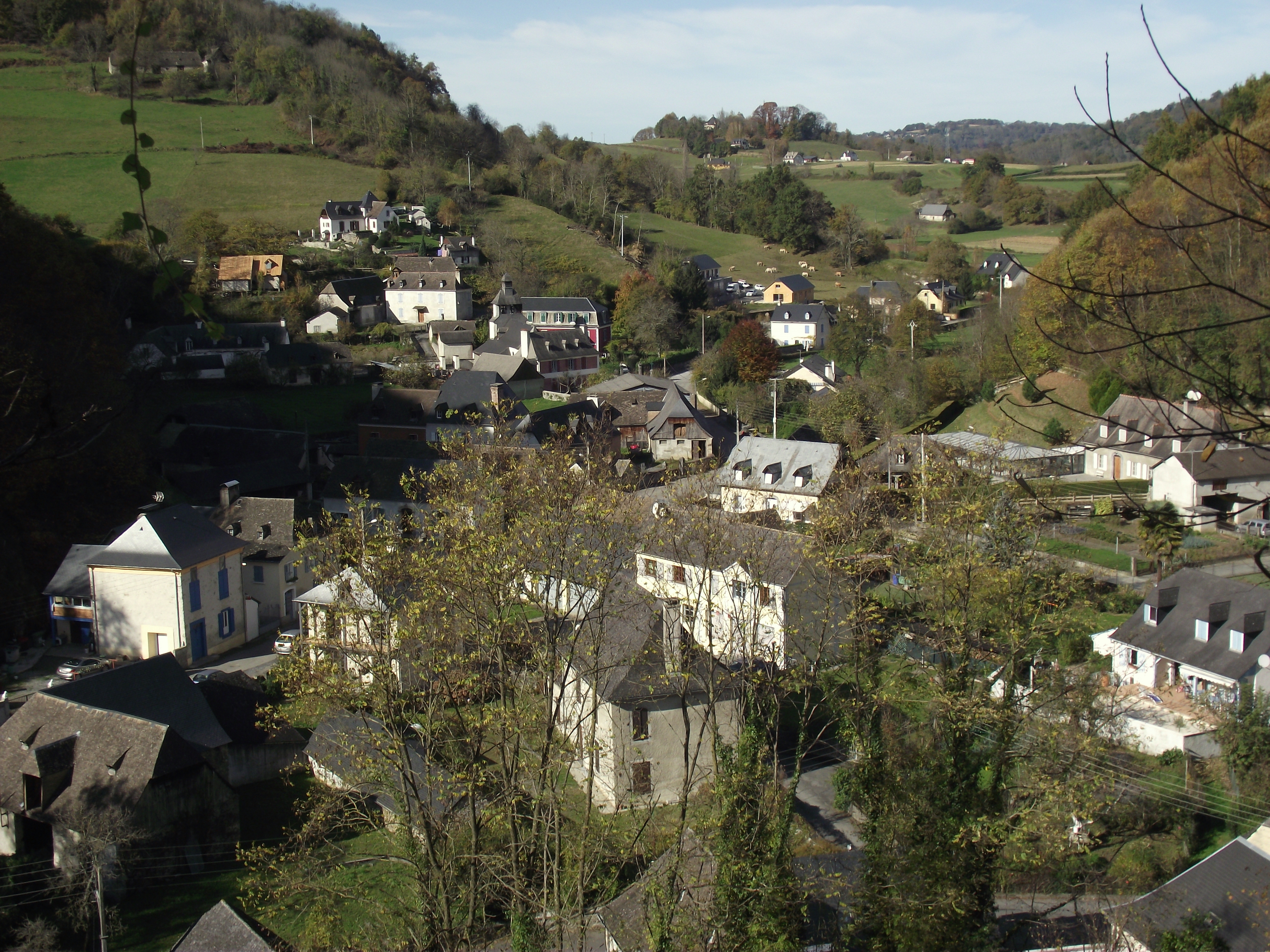 Les Angles (Hautes-Pyrénées, France)